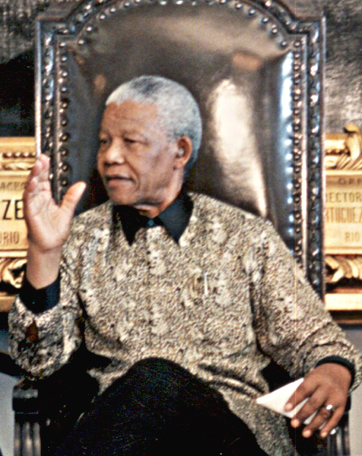 Brasília - O presidente da África do Sul, Nelson Mandela, é recebido na capital federal.